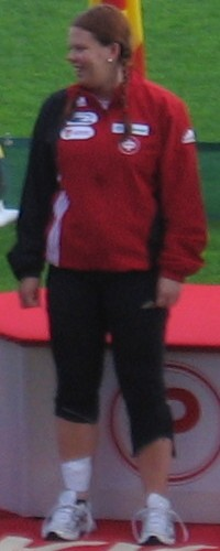 Merja Korpela Kalevan kisoissa, Ratinan stadionilla, Tampereella, 26. heinäkuuta 2008